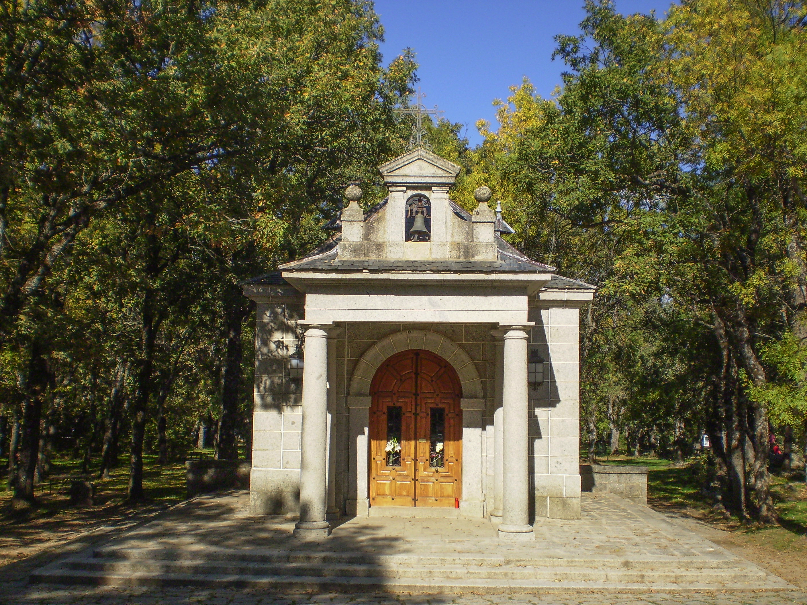 Ermita de la Virgen de Gracia. San Lorenzo de El Escorial. Community of Madrid, Spain